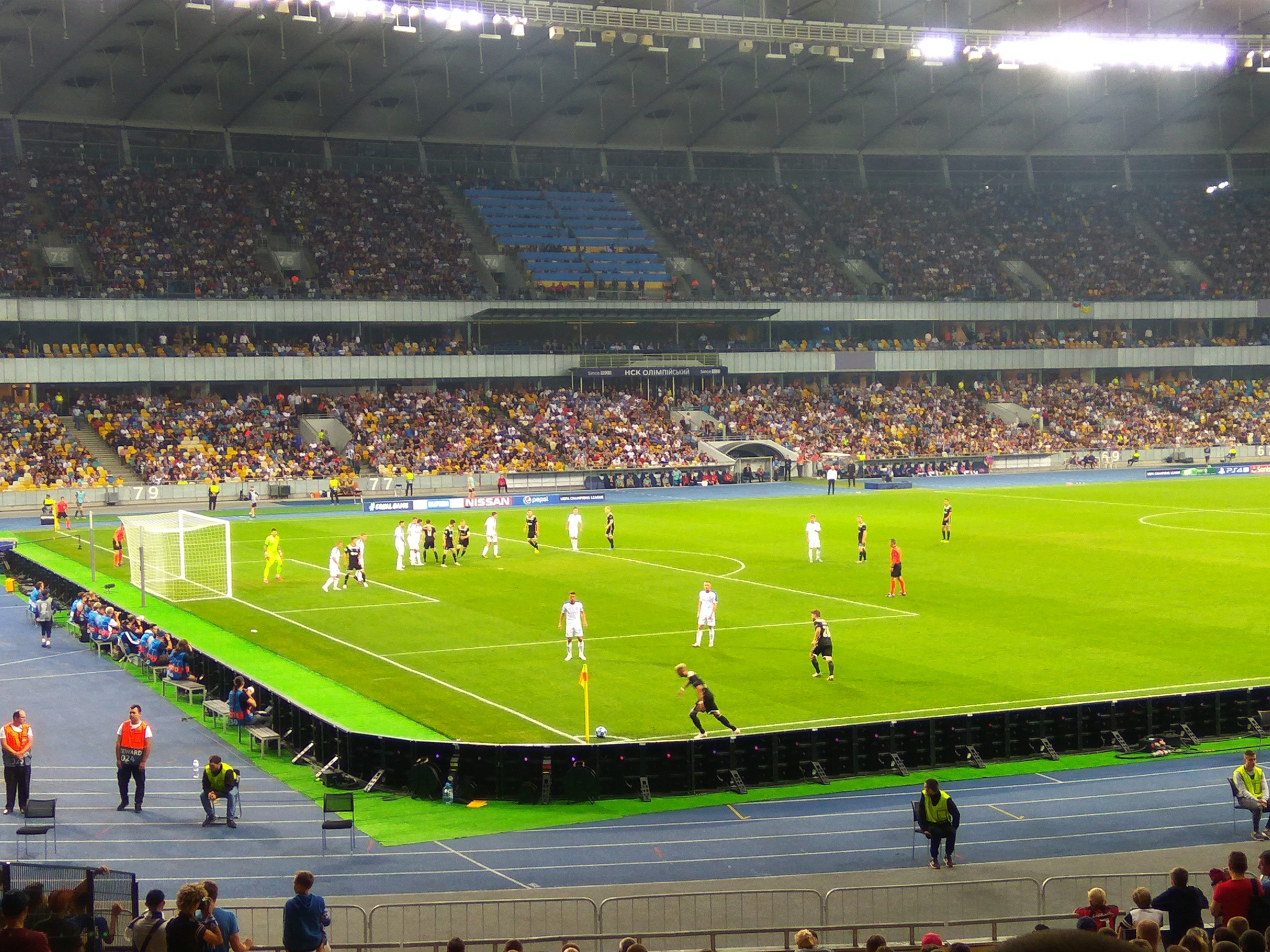 28.08.2018. Ліга чемпіонів УЄФА. Динамо (Київ) - Аякс 0:0